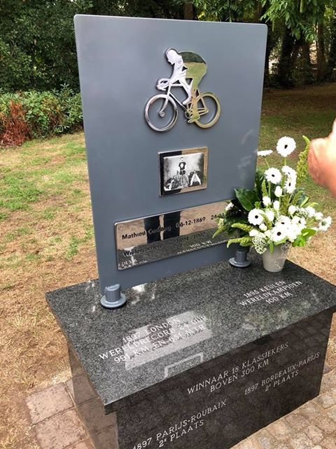 Denkmal zu Ehren von Mathieu Cordang, niederländischer Radrennfahrer (1869-1942) in Swalmen, Niederlande